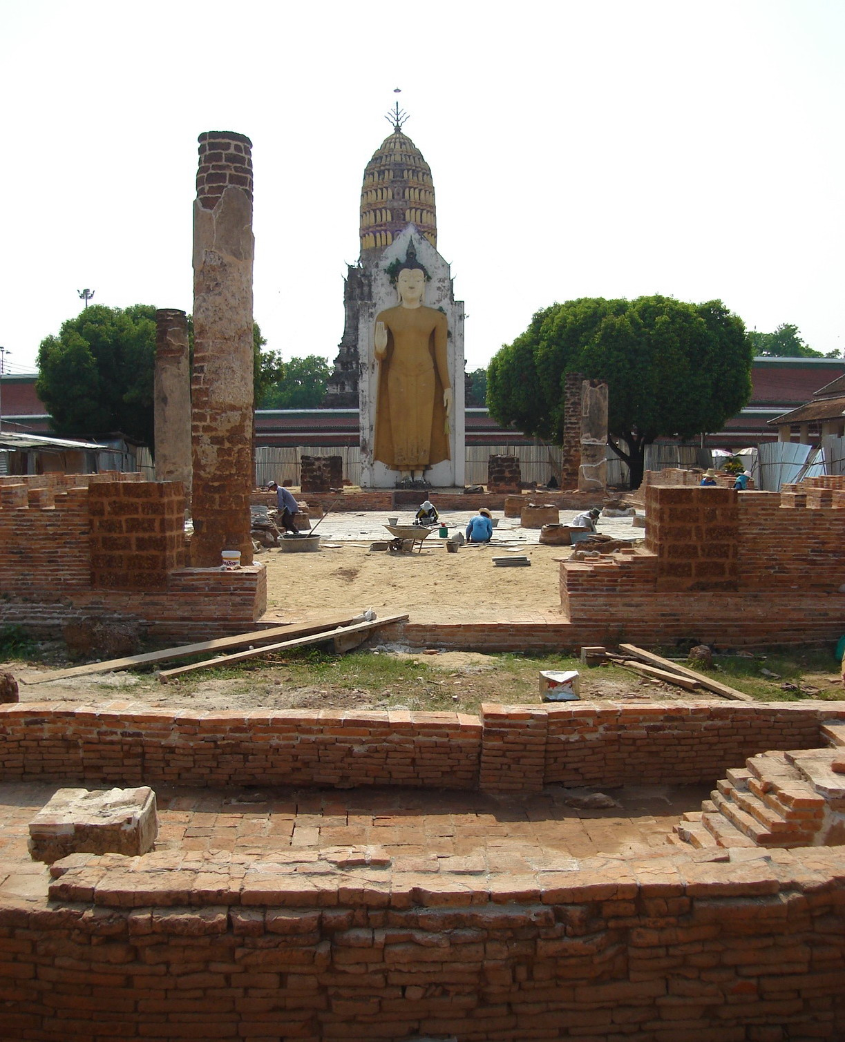 วิหารเก้าห้องพระอัฏฐารส (เดิมเนินวิหารเก้าห้อง) ขณะกำลังทำการบูรณะ วัดพระศรีรัตนมหาธาตุวรมหาวิหาร